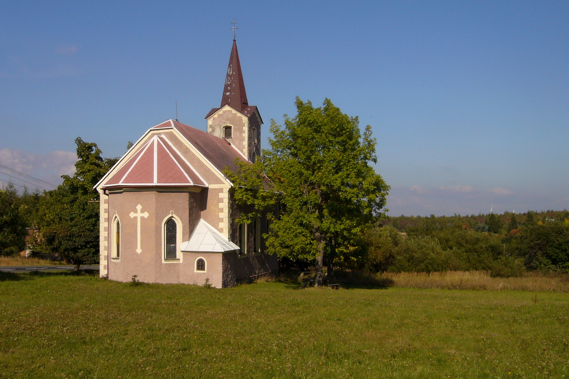 Horní Halže - kostel svaté Terezie